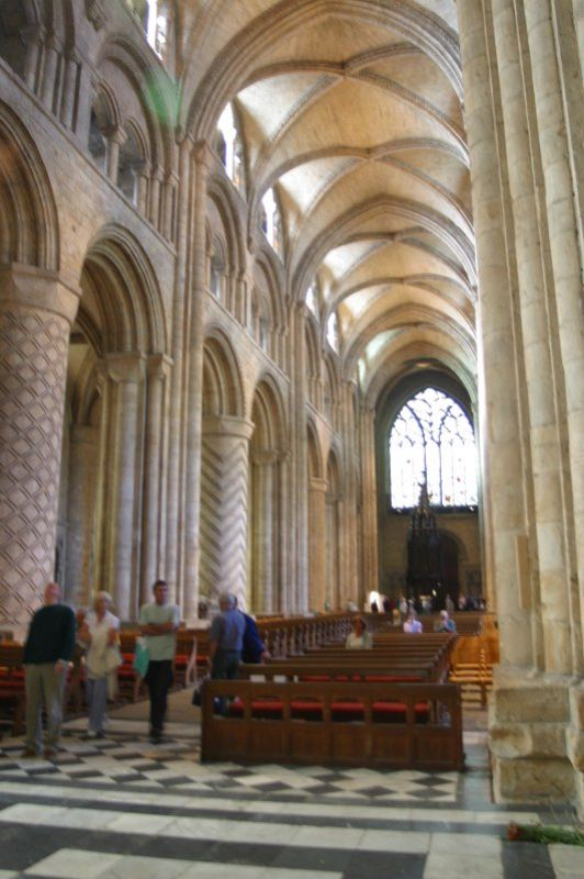 Durhamkatedralen,Interiør